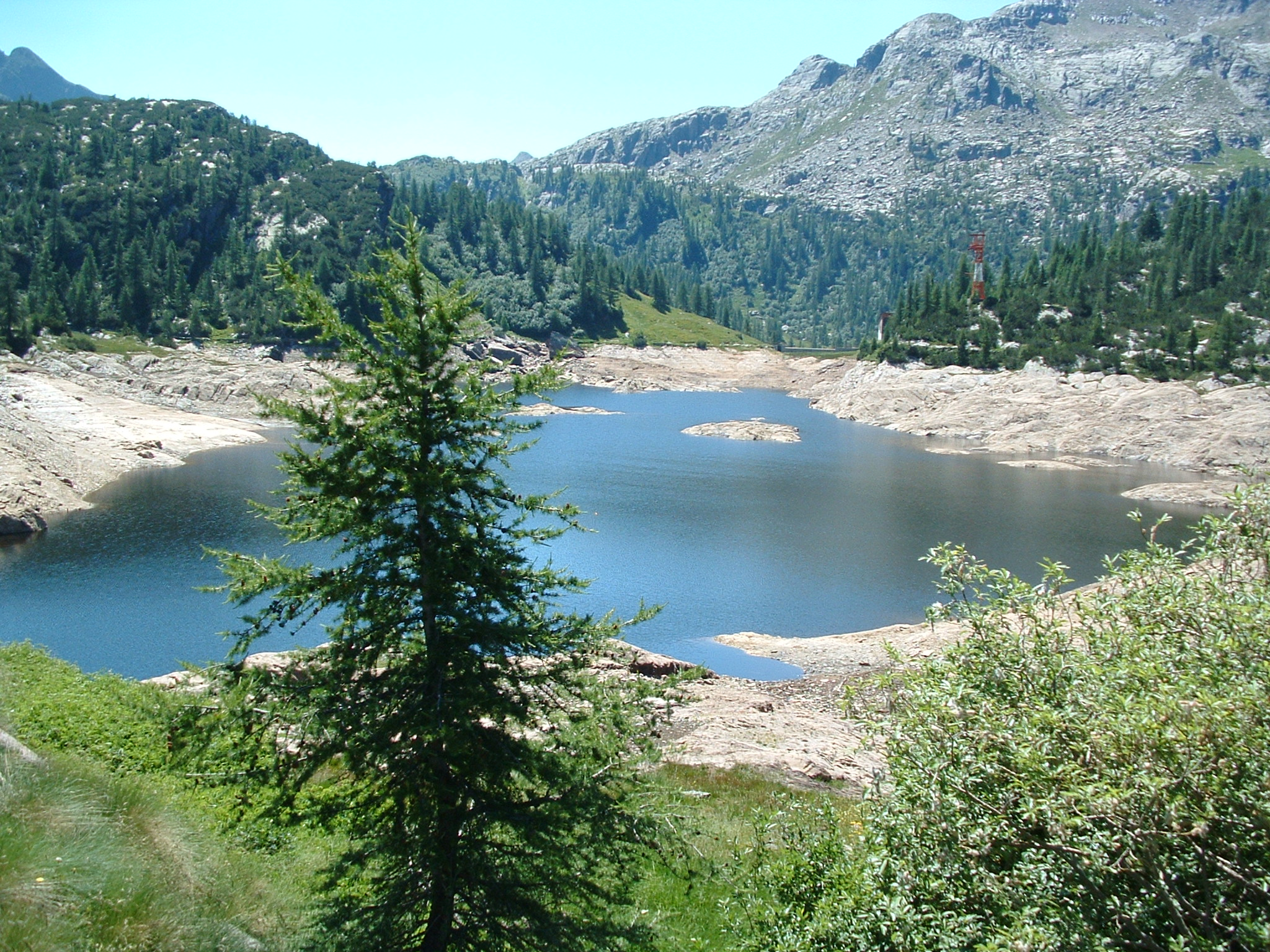 Lago Marcio, Orobie.